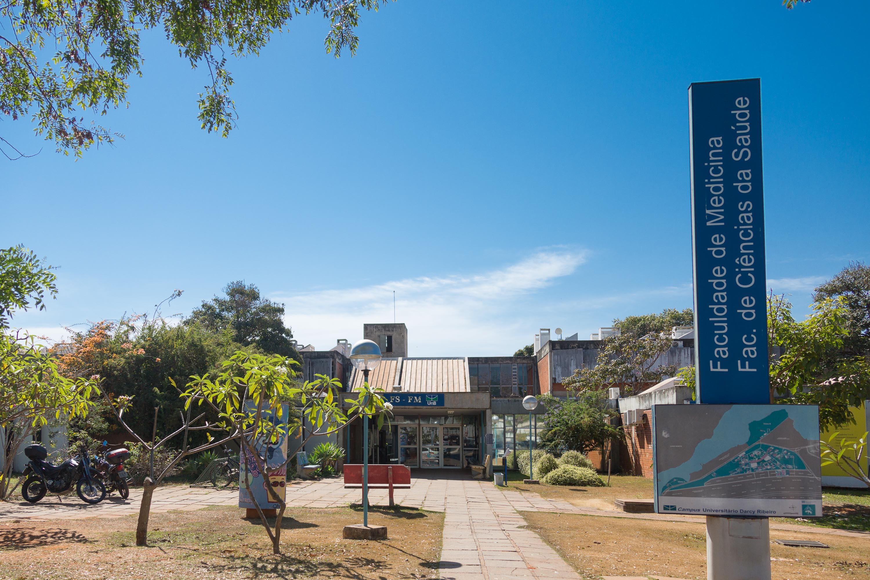 Faculdade de Medicina, Faculdade de Ciências da Saúde da Unb Foto:Raquel Aviani / Secom UnB. ATENÇÃO – As informações, as fotos e os textos podem ser usados e reproduzidos, desde que a fonte seja devidamente citada e que não haja alteração de sentido em seus conteúdos. Crédito para fotos: nome do fotógrafo/Secom UnB